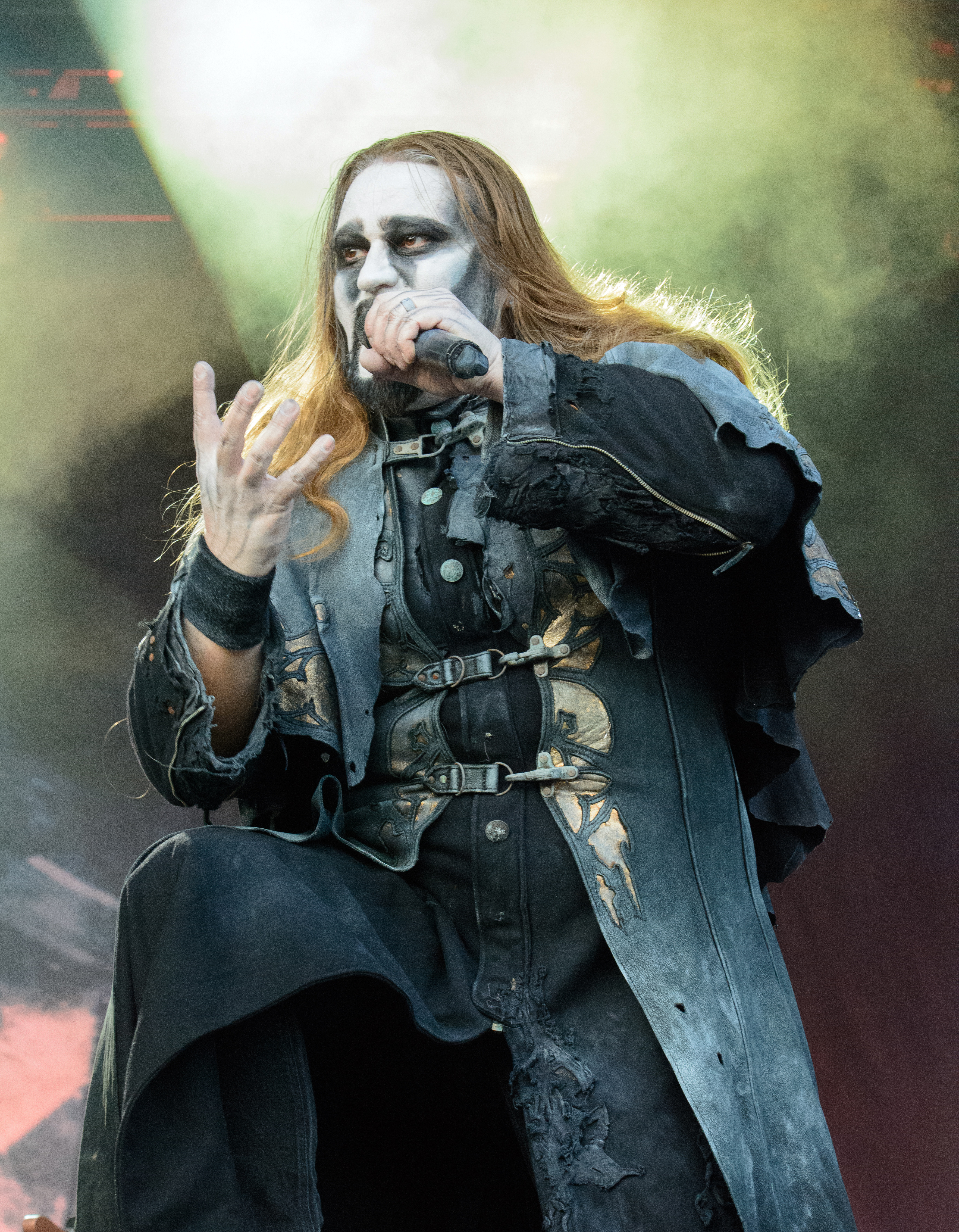 Powerwolf beim Elbriot 2016.